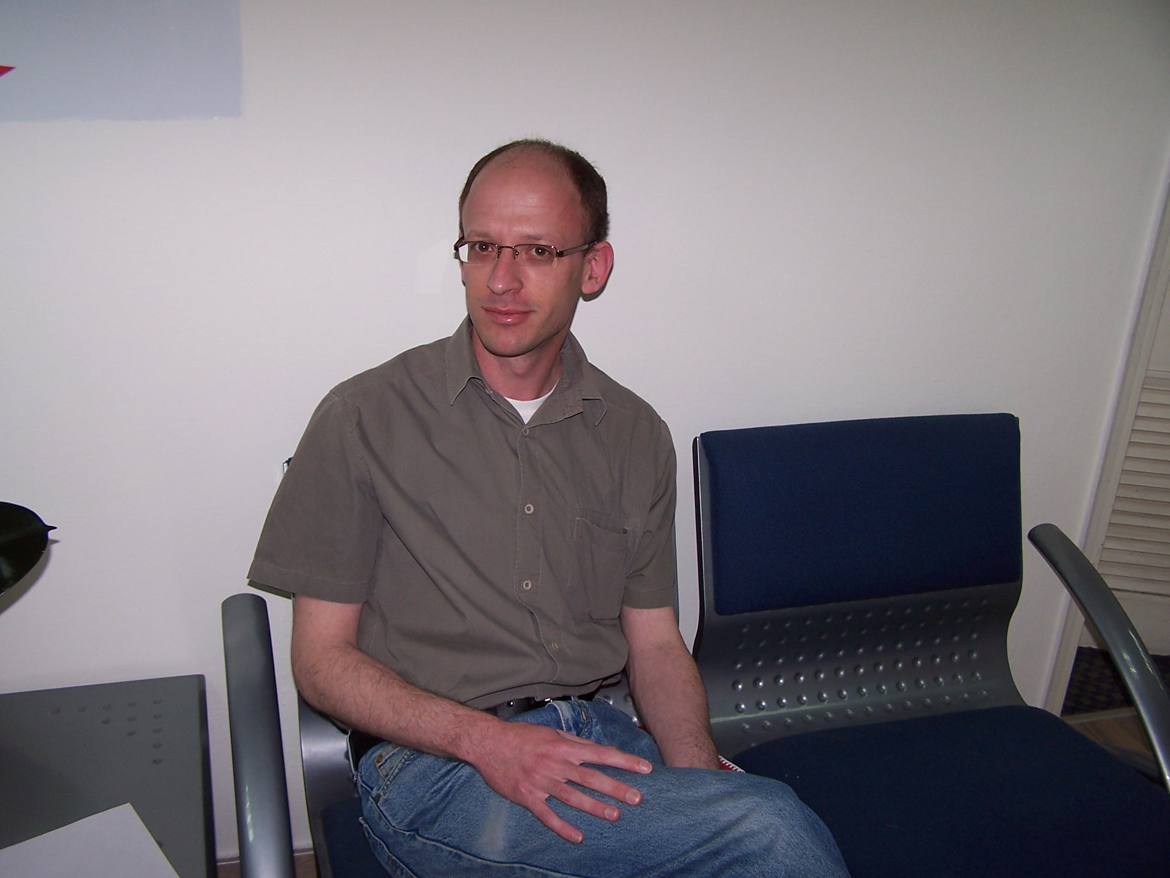 מייסד ישראבלוג יריב חבוט במשרדי nrg מעריב